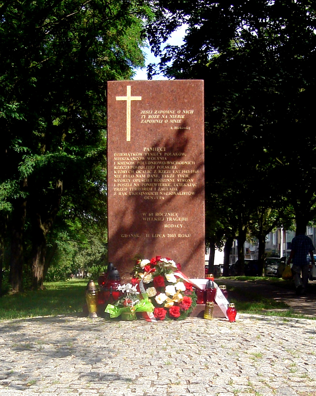 Pomnik poświęcony dziesiątkom tysięcy Polaków zamordowanych na Wołyniu i Kresach Wschodnich Rzeczypospolitej przez ukraińskich nacjonalistów z OUN-UPA w latach 1943-45. Umiejscowiony pomiędzy ul. Stolarską i ul. Mniszki.